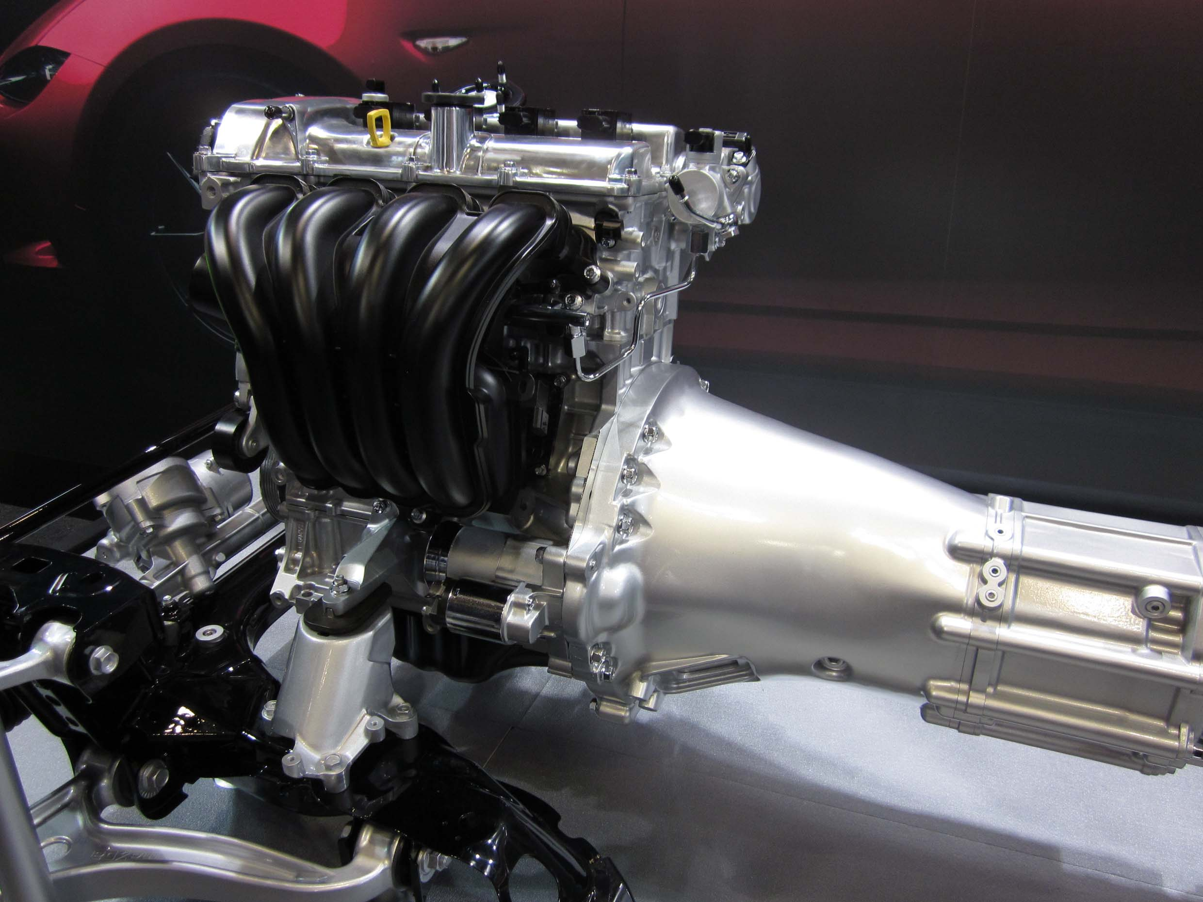 人とくるまのテクノロジー展2015にて